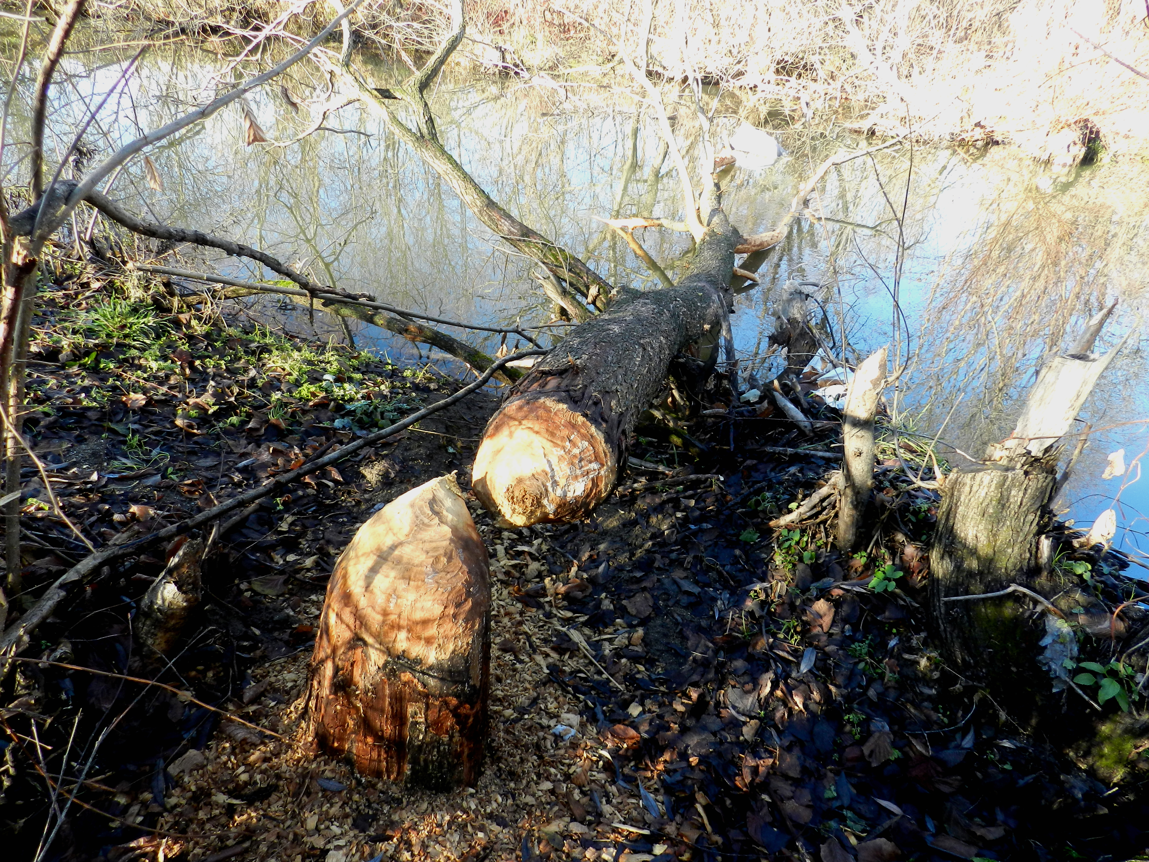 Hódrágta fa a Kormos árterében